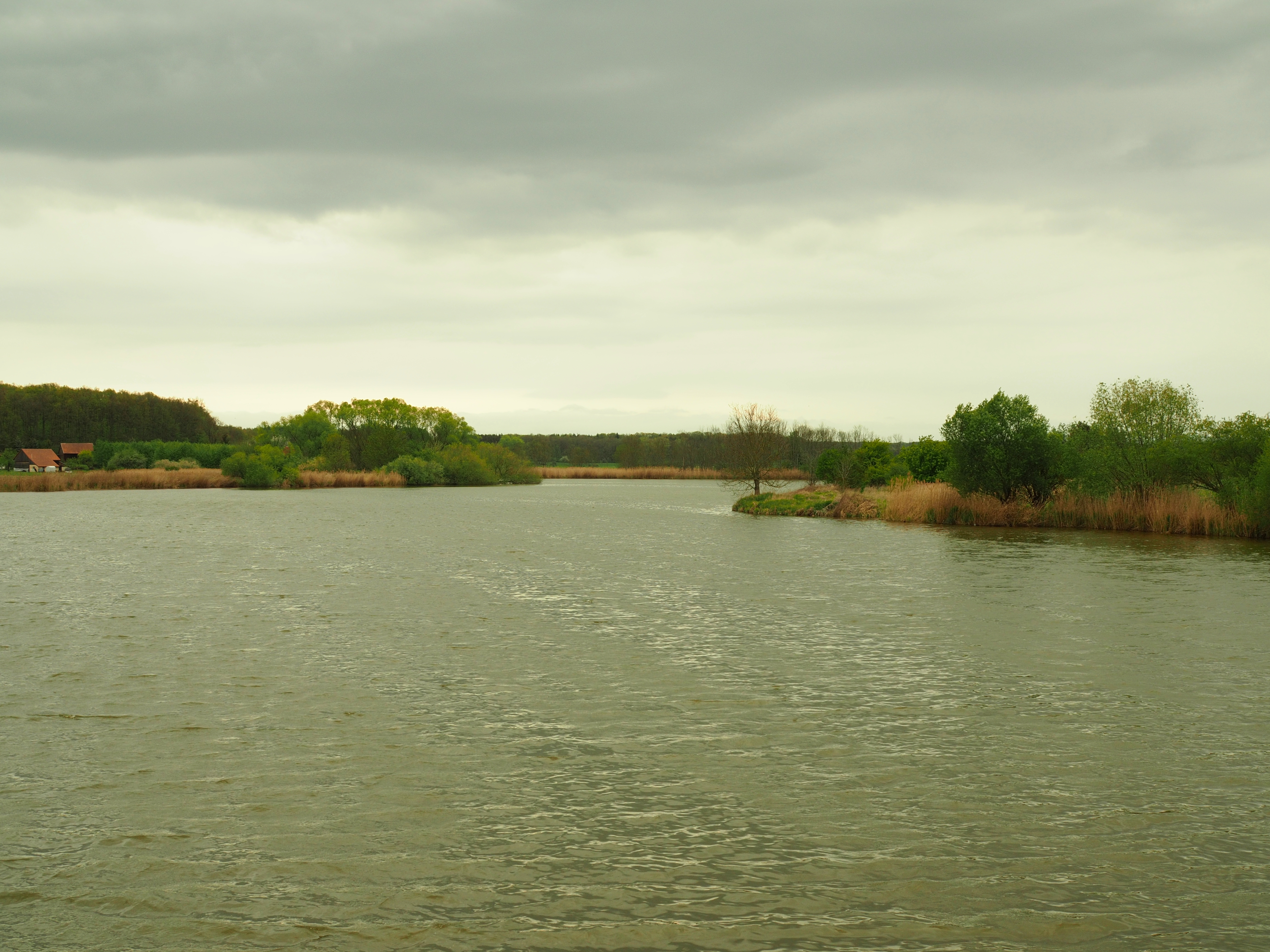 Nečaský rybník u Chotěšic (Nečaský pond near Chotěšice) Project: Chráněná území